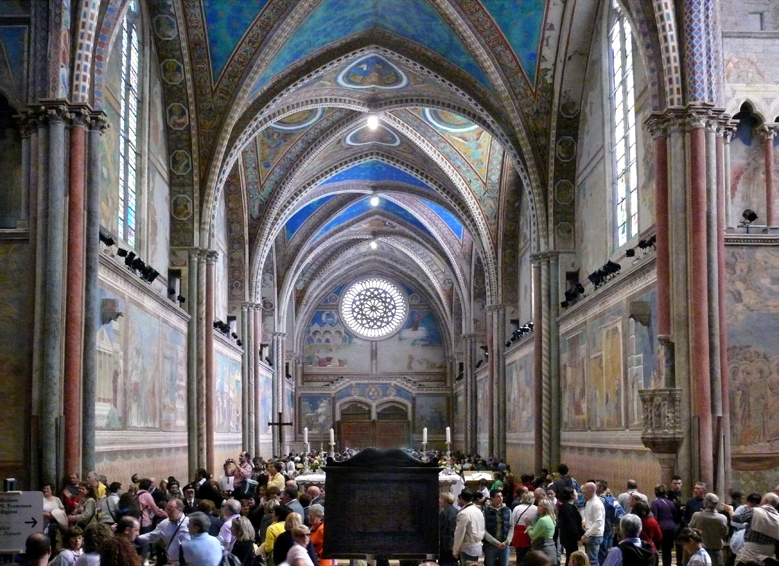 interno della navata della basilica di San Francesco in Assisi